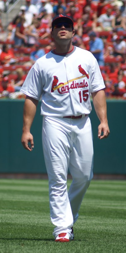 Matt Holliday